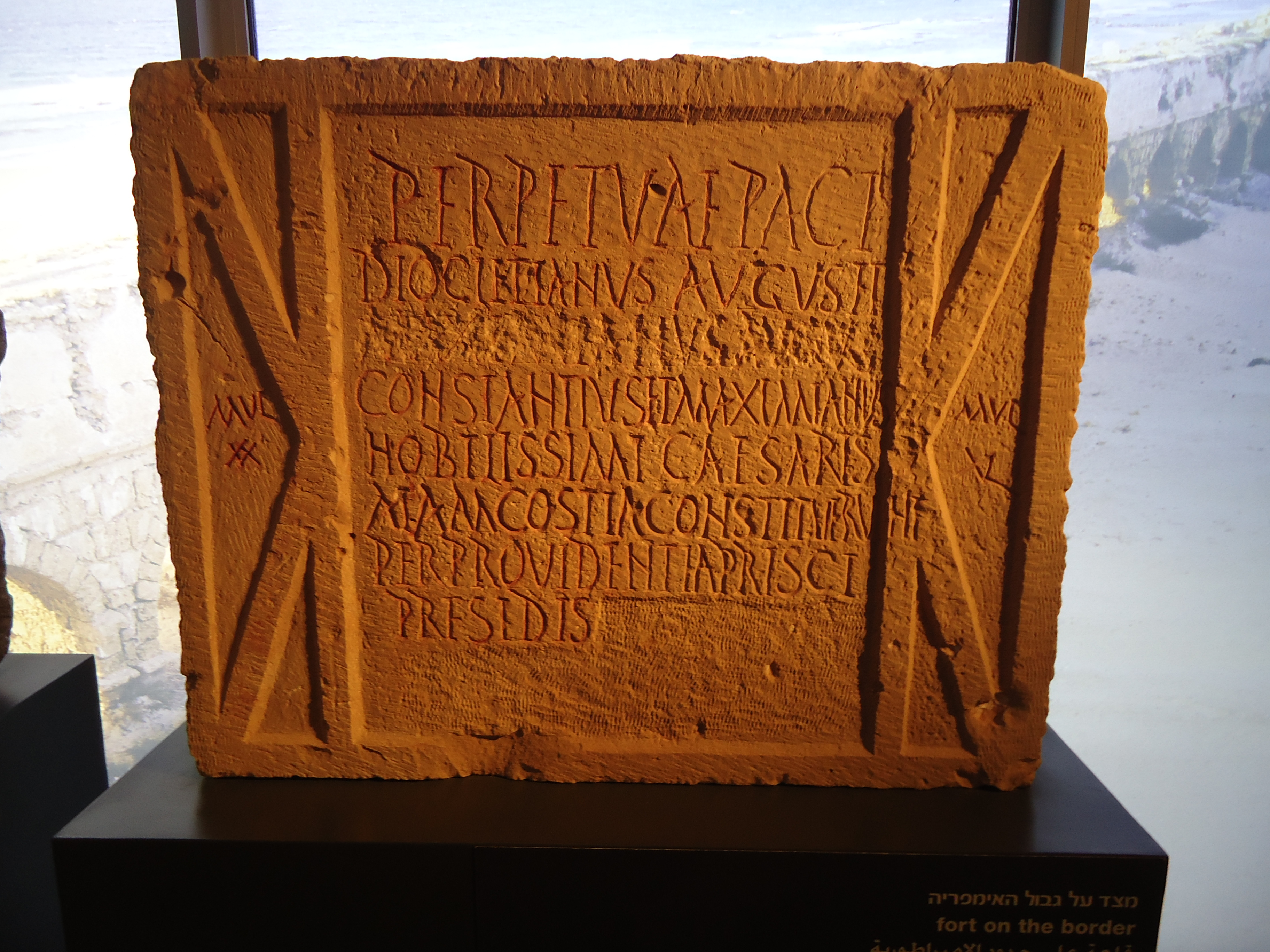 Término augustal romano procedente de Jotvata (Israel), correspondiente con AE 1986, 699 = AE 1987, 961 = AE 1990, 1015 = AE 1992, 1714 = AE 2002, 1563 = AE 2004, 1590: Perpetuae Paci / Diocletianus Augus(tus) et / [ [Maximianus August(us)] ] / Constantius et Maximianus / nobilissimi Caesar(e)s / alam Costia constituerunt / PER providentia(m) Prisci pr(a)esidis [ [provinciae] ] / [ [Syriae Palaestinae] ] // mul(tis) XX // mul(tis) XL